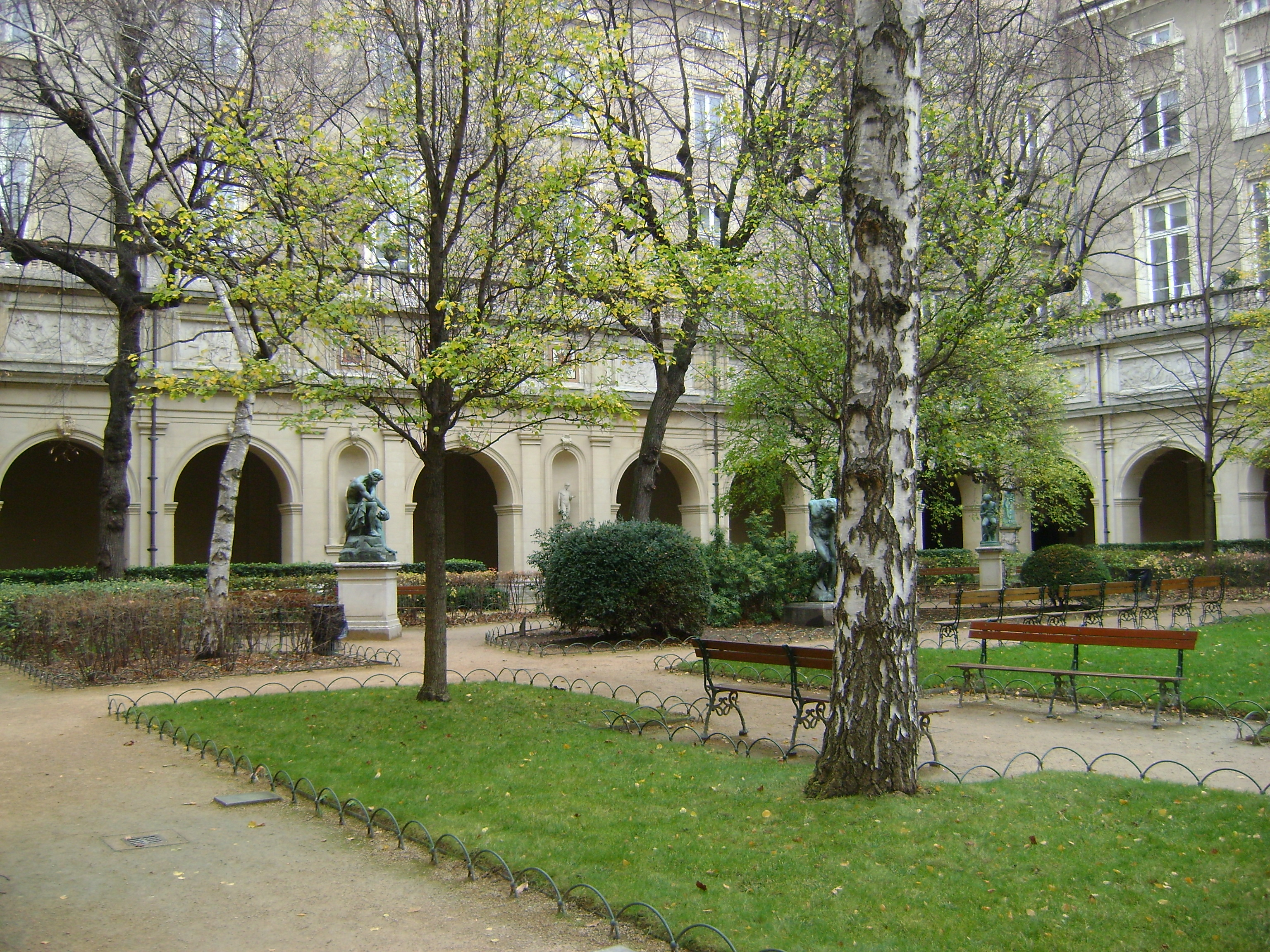 Cour intérieure du Palais Saint-Pierre (ancienne abbaye des Dames de Saint-Pierre de Lyon), actuel Musée des Beaux-Arts. This building is en partie classé, en partie inscrit au titre des Monuments Historiques. .